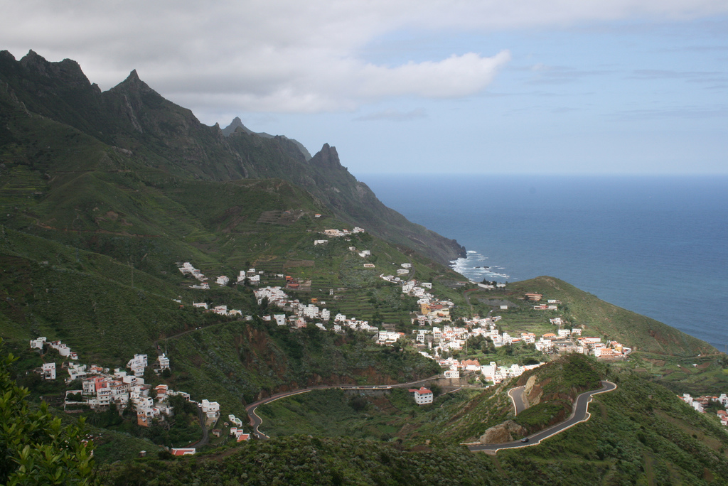 Vista de Taganana (Santa Cruz de Tenerife)